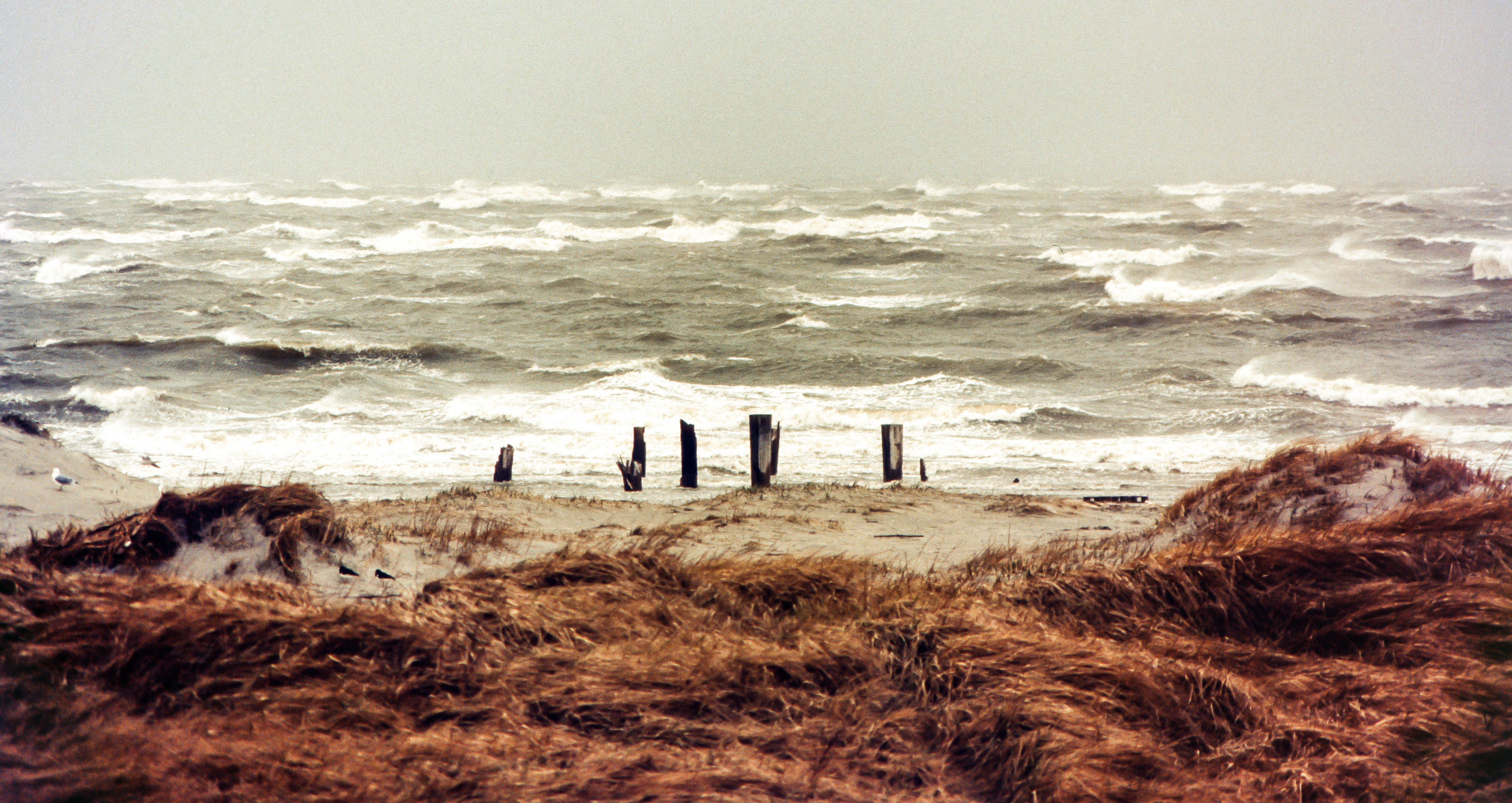 Scharhörn am 1. April 1994 bei einer Sturmflut (ca 1,75m ü. MTHW). Blick vom Hamburger Haus auf die Reste der Vogelwärterhütte von 1954.